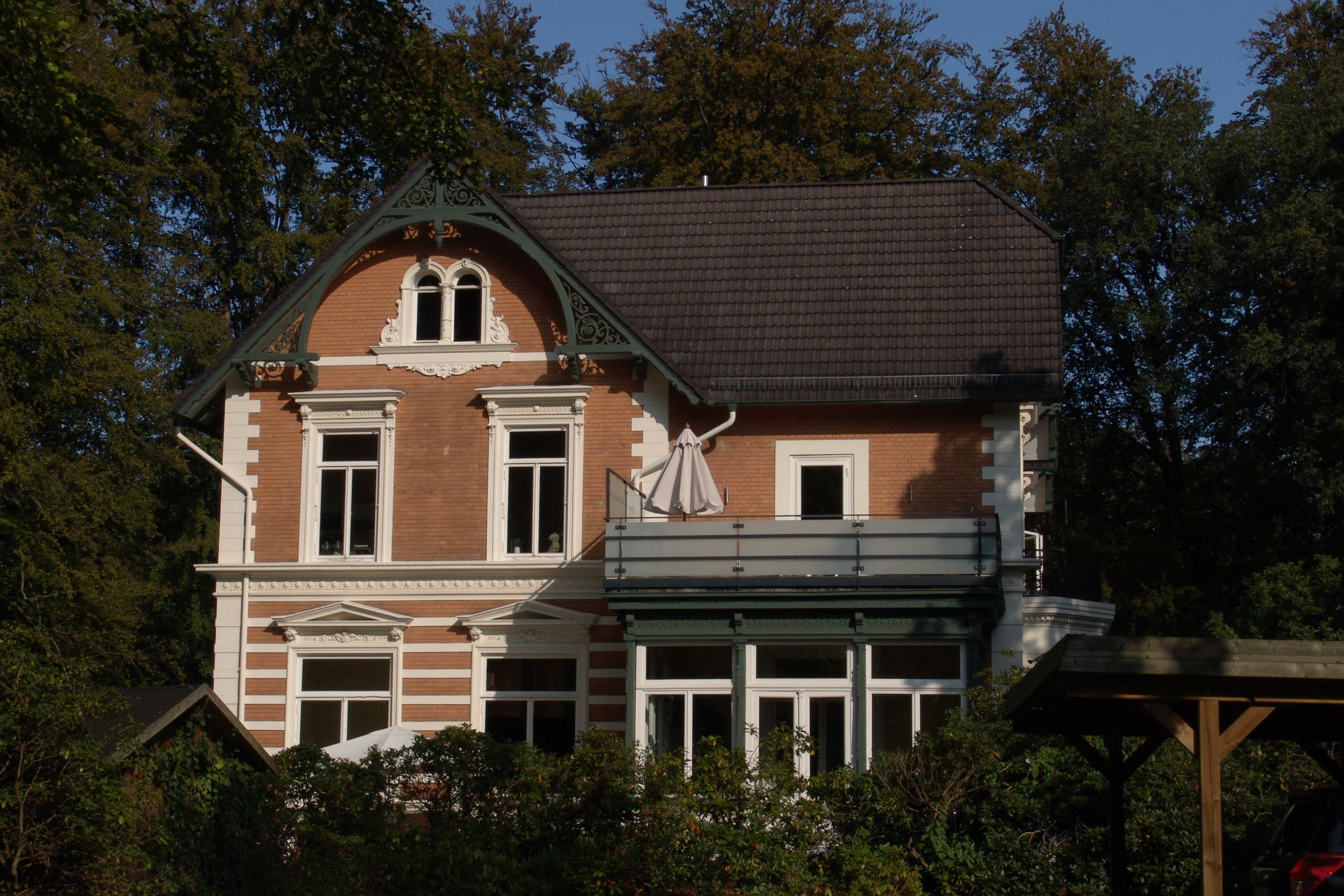 Villa Waldwiese, Villa Klosterkämper in Bremen, Am Lindenberg 18A.Das abgebildete Objekt ist ein geschütztes Kulturdenkmal in der Freien Hansestadt Bremen, mit der Nr. 1774 beim Landesamt für Denkmalpflege registriert.